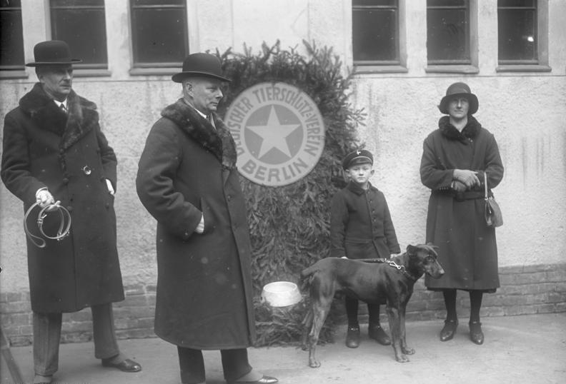 Eine seltene Auszeichnung. Der Hund als Lebensretter! Der Dobermann "Strolch", welcher den Sohn seines Herrn, den 7 jährigen Robert Lehnsack aus einem Fischteich, in welchen er mit seinem Schlitten einbrach, vom Tode des Ertrinkens rettete, wurde vom Deutschen Tierschutz-Verein durch ein breites Halsband mit einem kleinen Nickelschild, welches die Inschrift trägt: "Dem Lebensretter" ausgezeichnet. Der 7 jährige Robert Lehnsack mit seiner Mutter und dem Dobermann "Strolch" beim Deutschen Tierschutz-Verein, wo der Vorsitzende General a.D. von Kühlwein (im Vordergrund) dem Lebensretter das Halsband übergab.